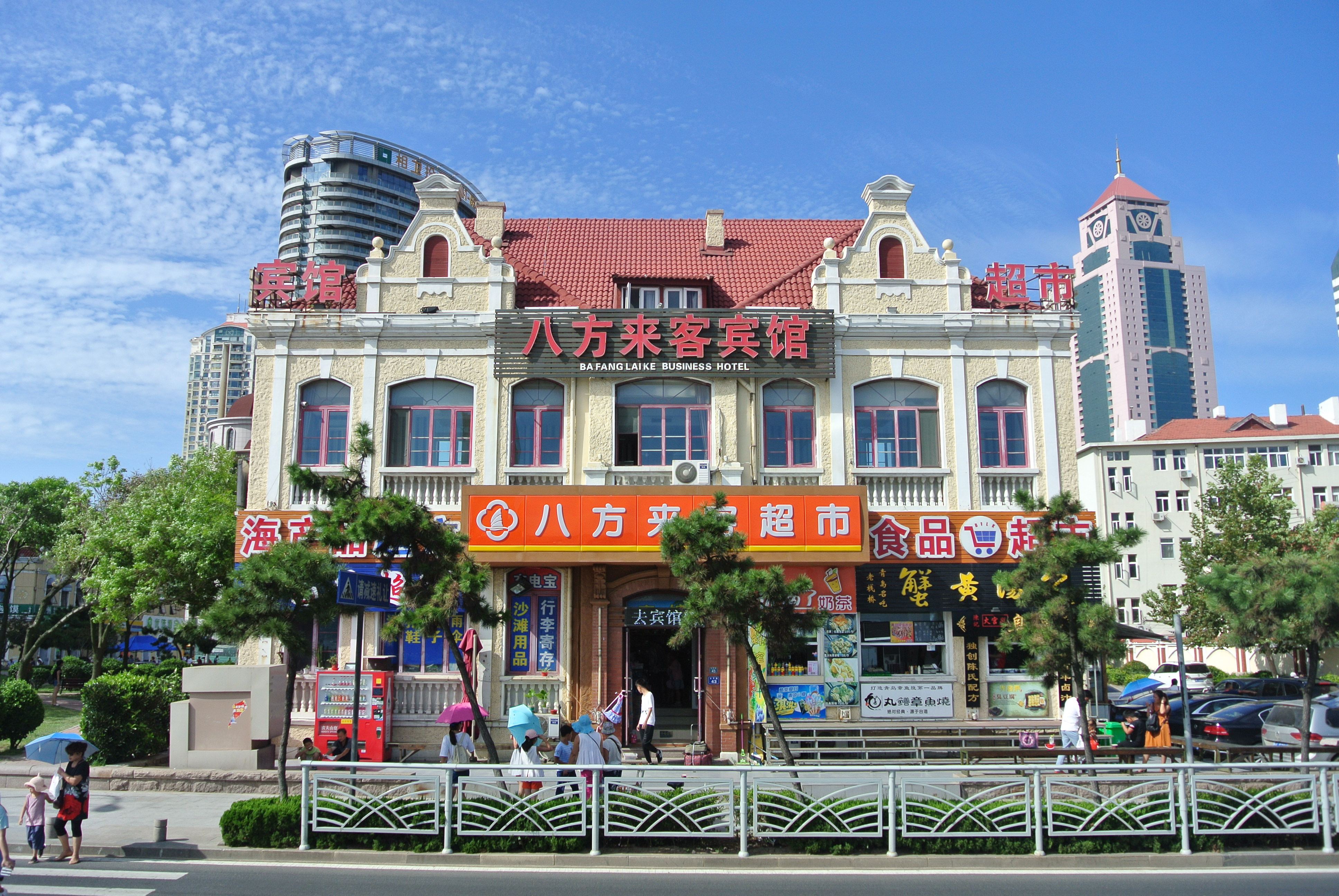 青岛礼和洋行旧址